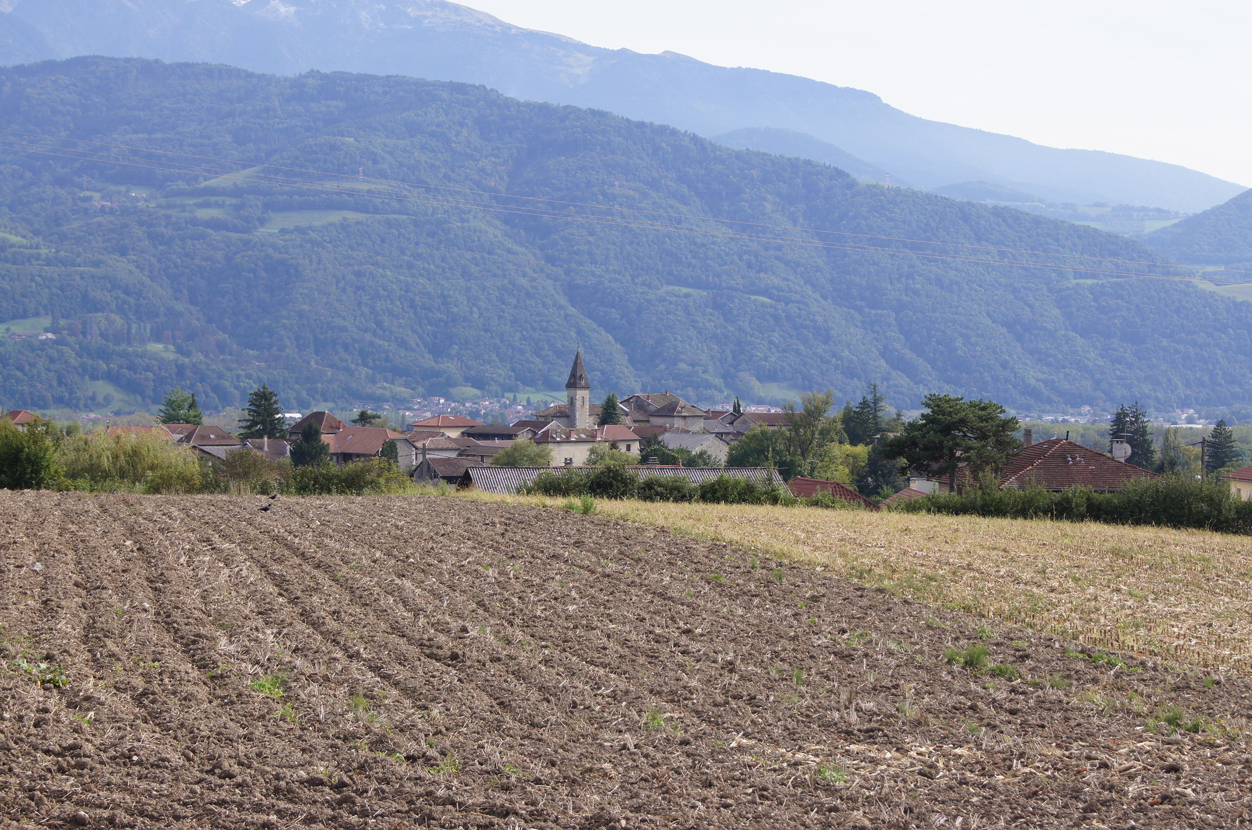 ST NAZAIRE LES EYMES le village